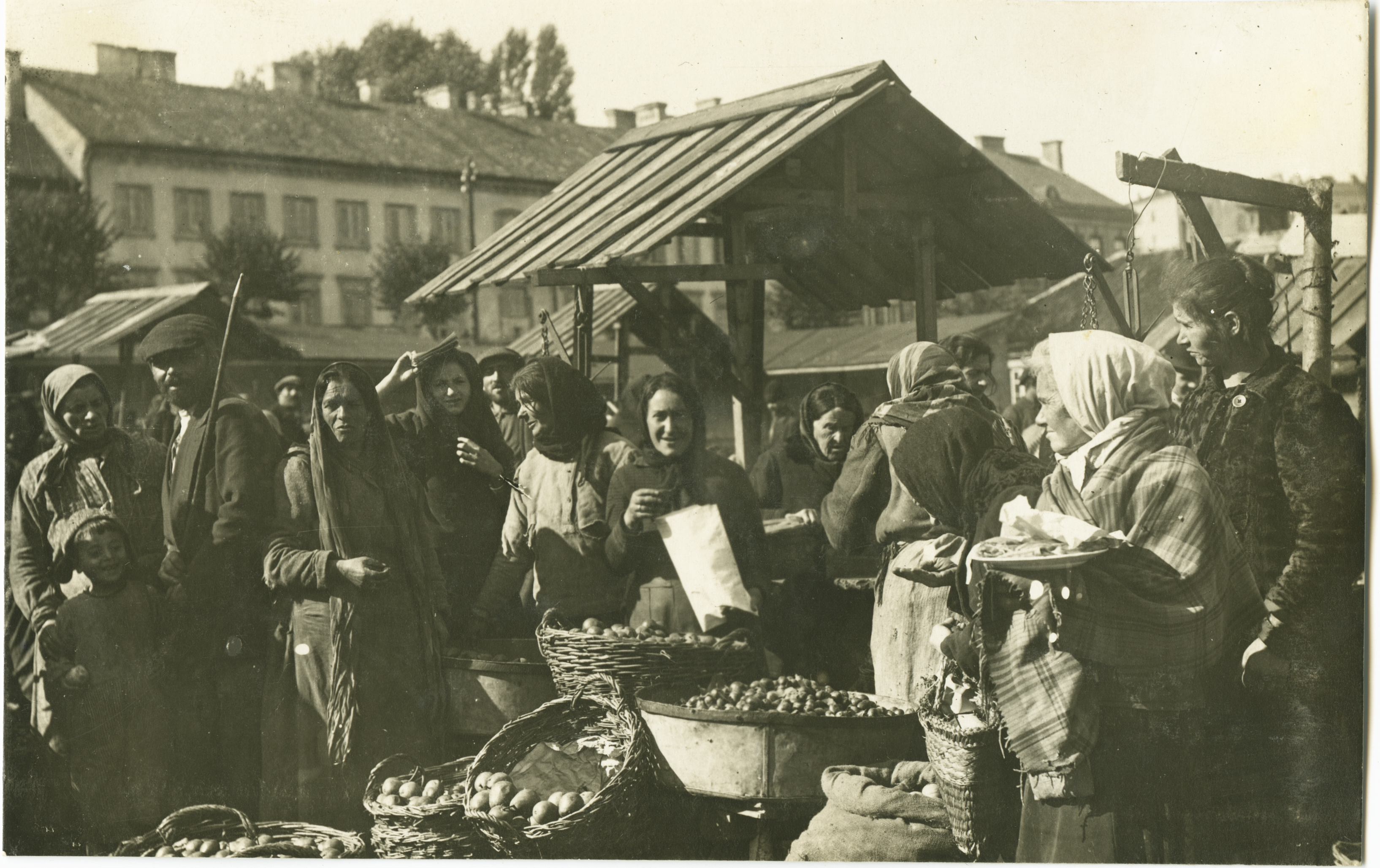 Vilniaus turgus, tikėtina - Malkų turgus, apie 1916-1917 m.